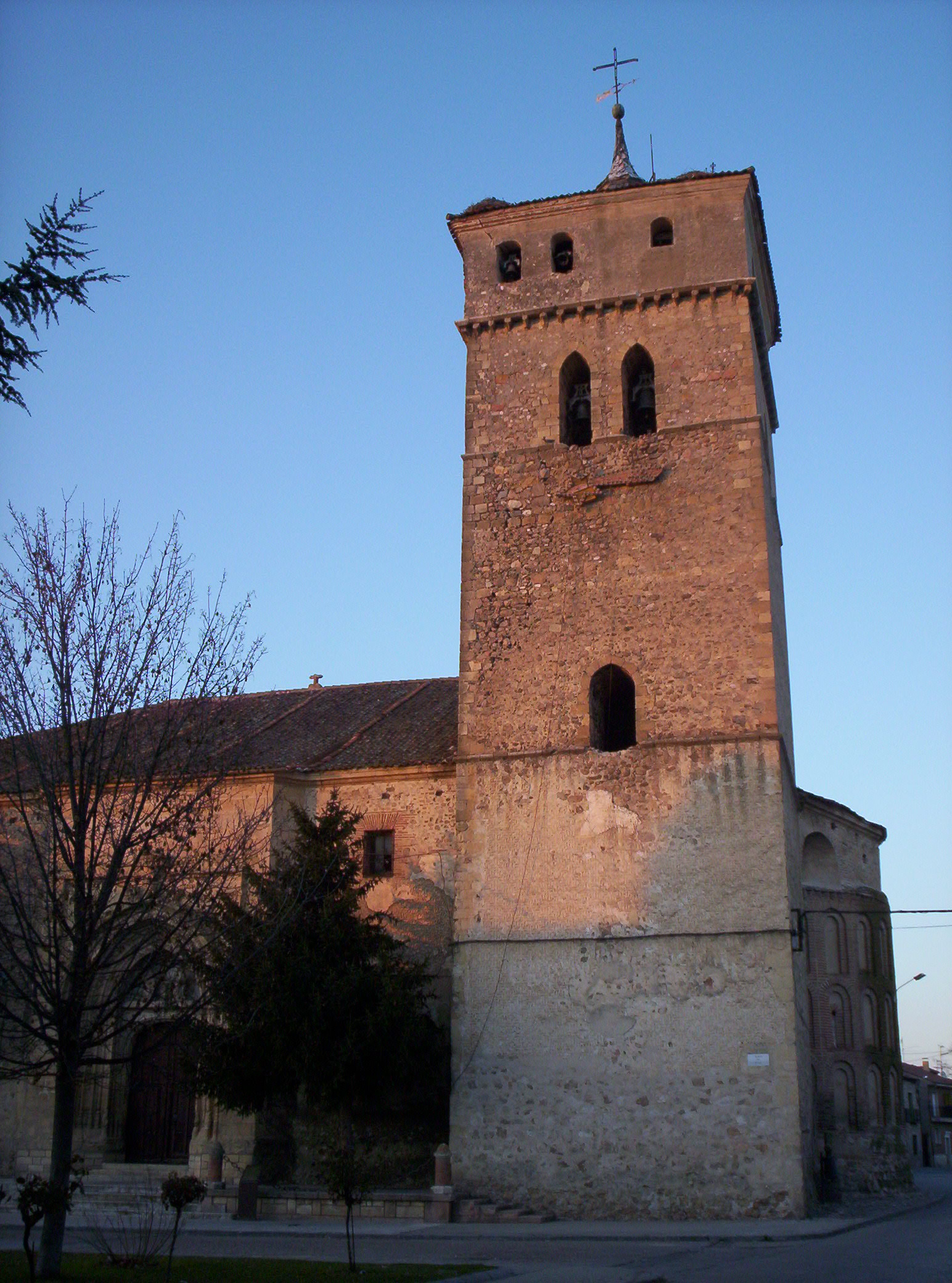 Santa María de Aguilafuente (Segovia). Torre, ábside (a la derecha, en sombra) y pórtico.